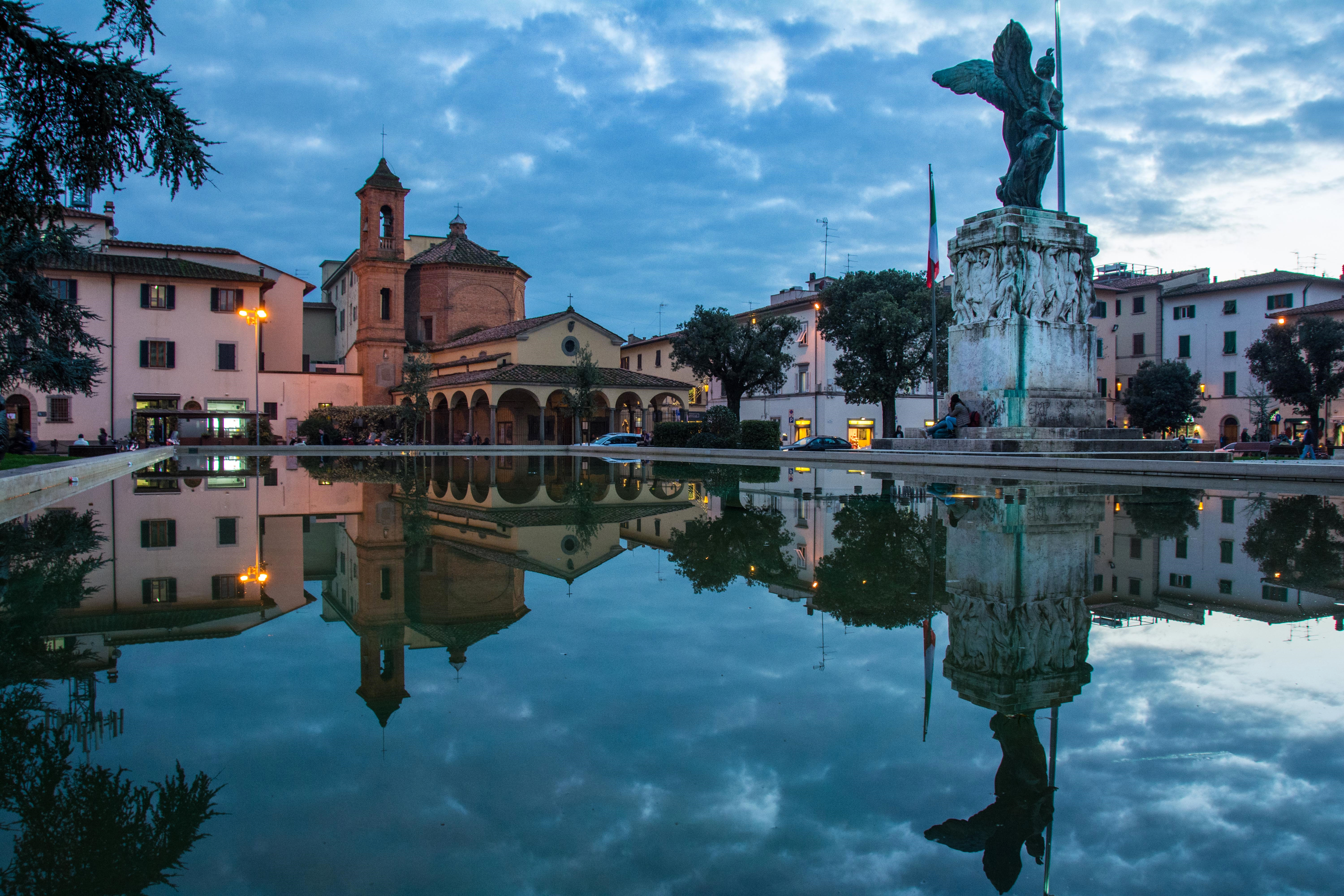 Monumento e fontana This is a photo of a monument which is part of cultural heritage of Italy.